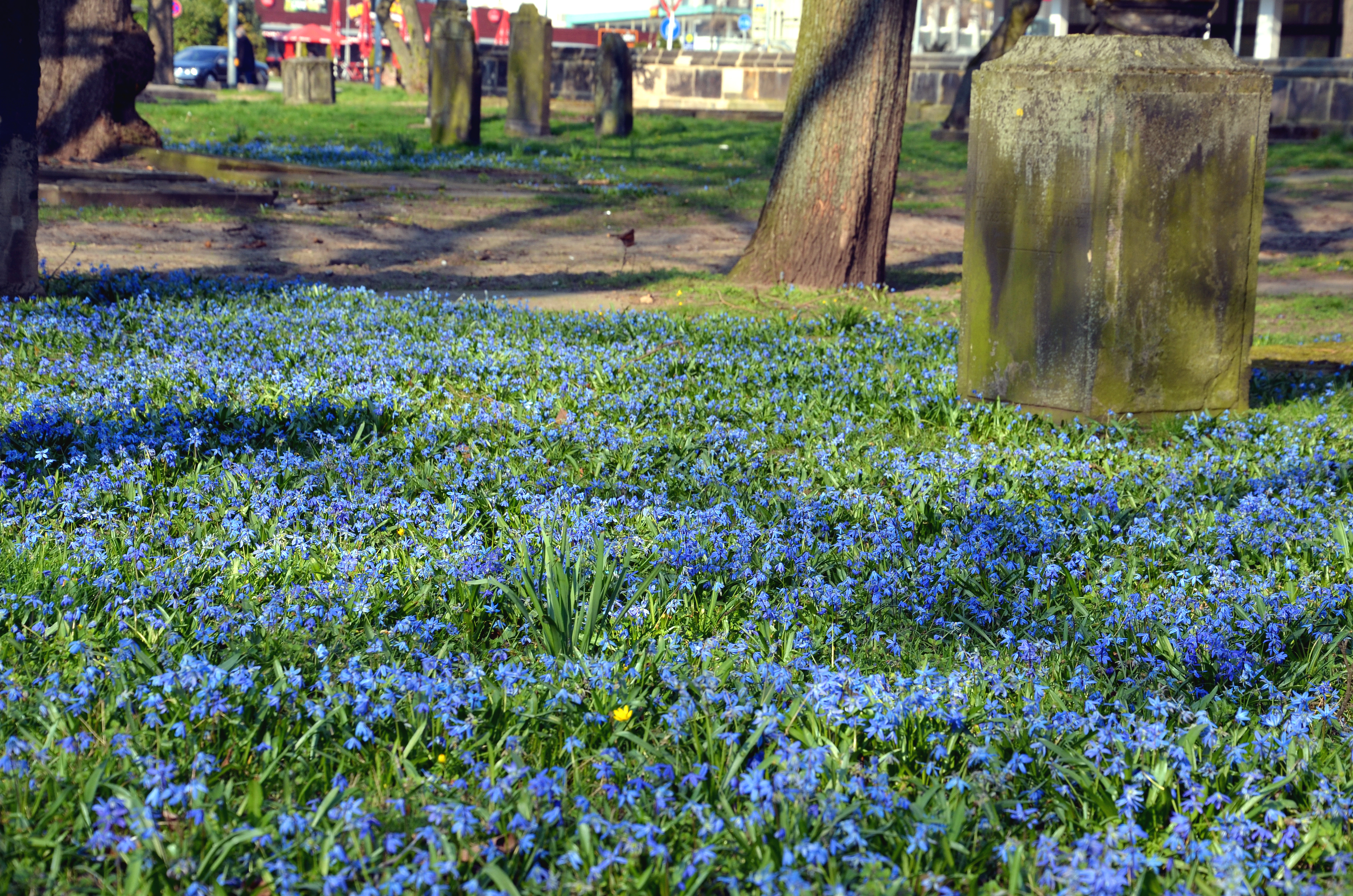 Scilla-Blüte auf dem im Zuge der innerstädtischen Umbauarbeiten Hannover City 2020 + umgestalteten Alten St. Nikolai Friedhof ...